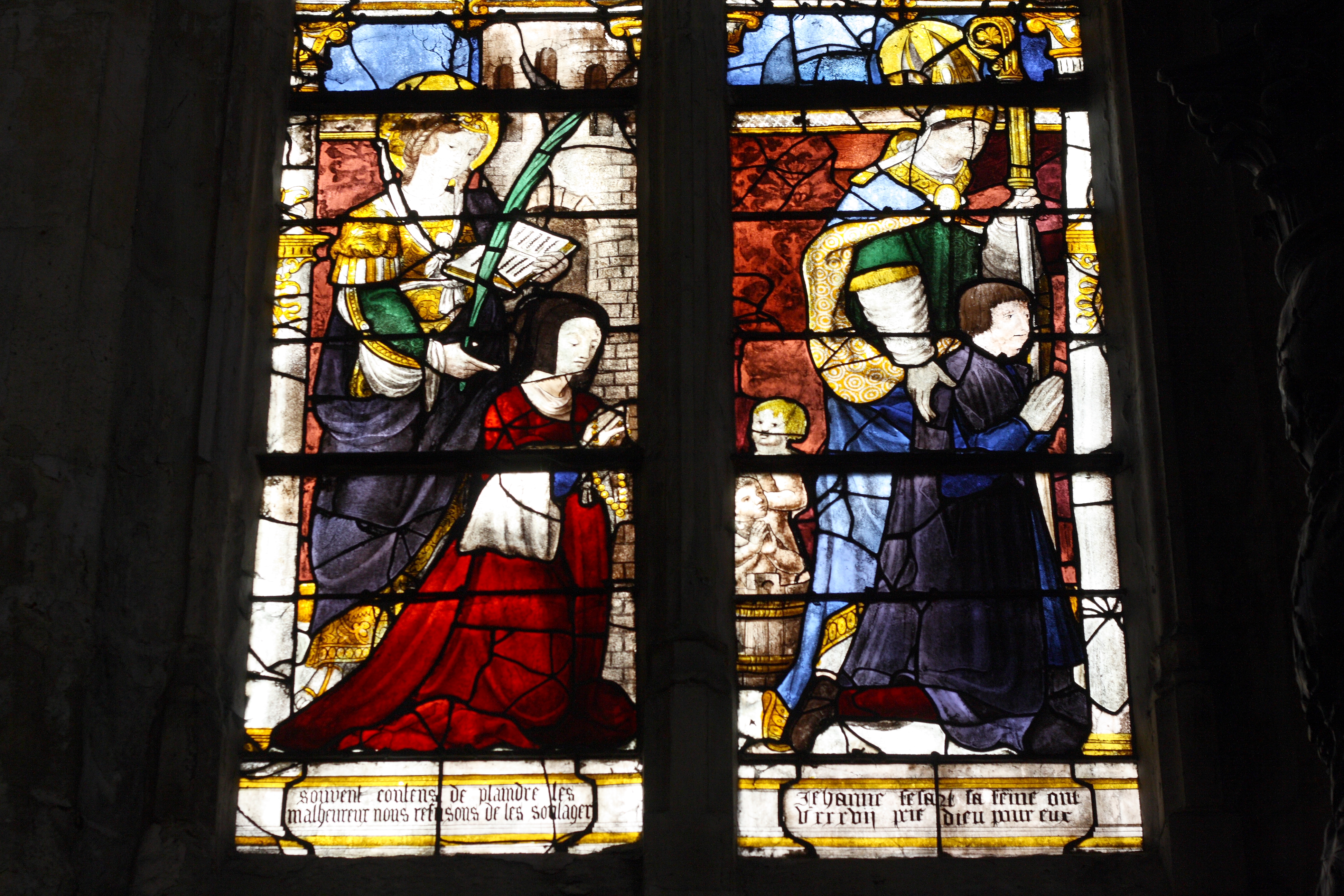 Katholische Pfarrkirche Saint-Martin in Herblay, einer Gemeinde im Département Val d'Oise (Île de France), Bleiglasfenster von 1537 mit Szenen der Legende des hl. Nikolaus (oben) und Stifterfiguren (unten) (Ausschnitt)